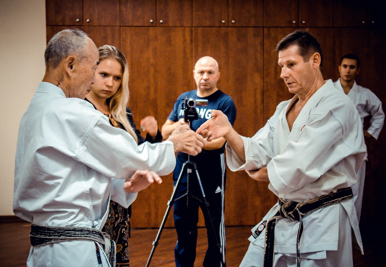 2006 год 666